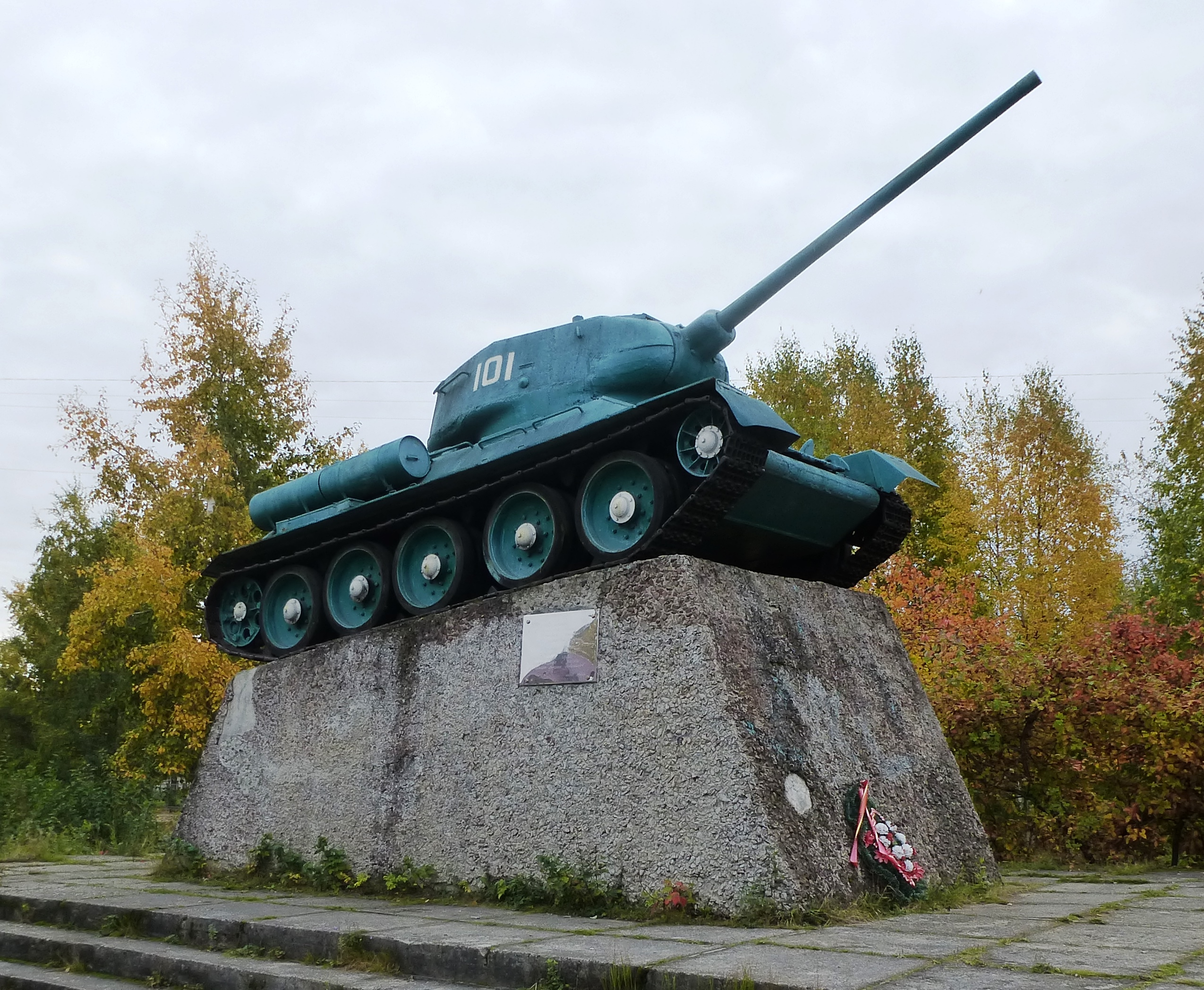 Памятник "Танк Т-34" в г.Медвежьегорск, Республика Карелия. Установлен в 1969 году в честь 25-летия освобождения города от финских оккупантов